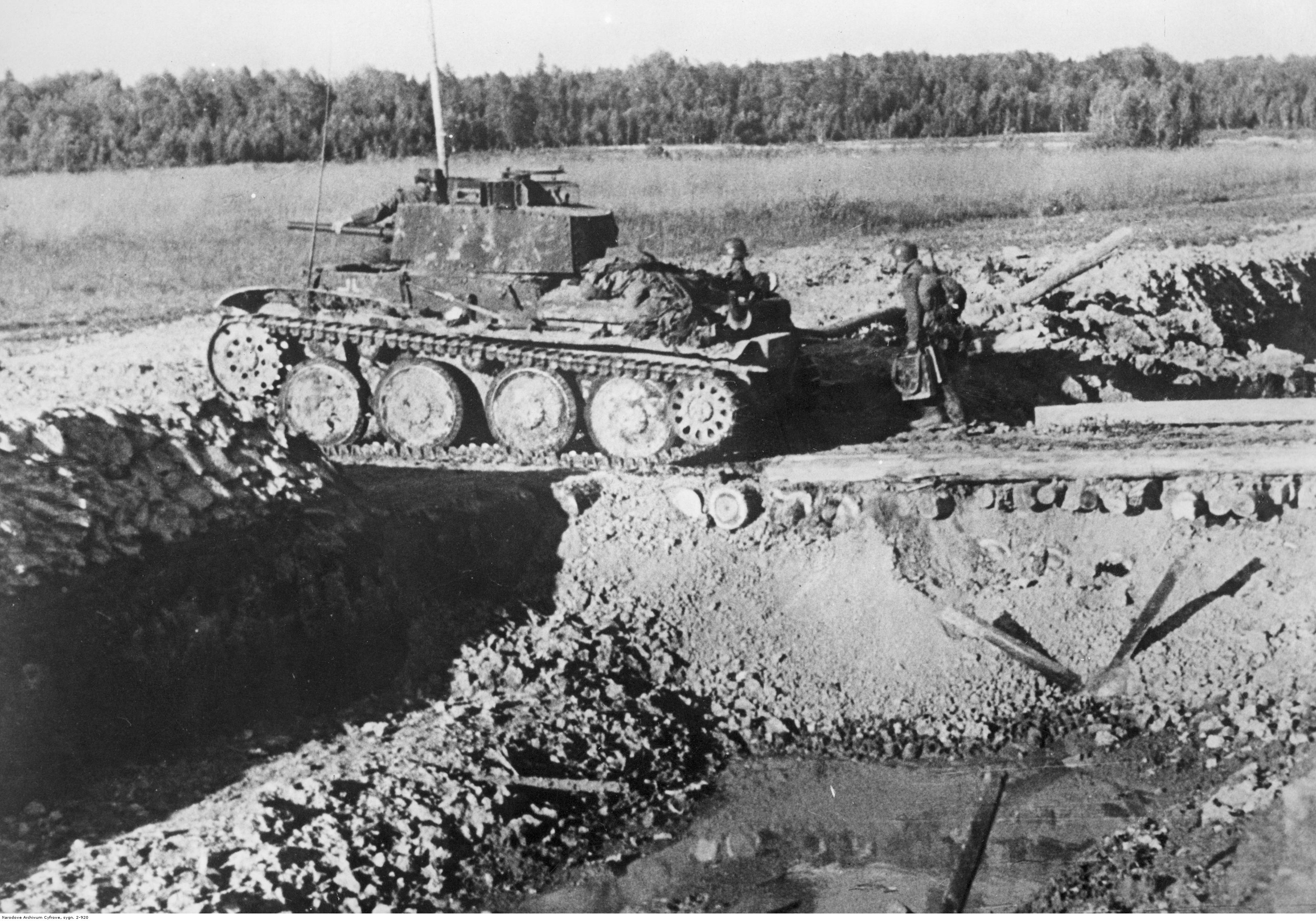 Czołg niemiecki PzKpfw 38 (t) Ausf E/F przejeżdża przez przesmyk na rowie przeciwczołgowym w rejonie Rżewa.